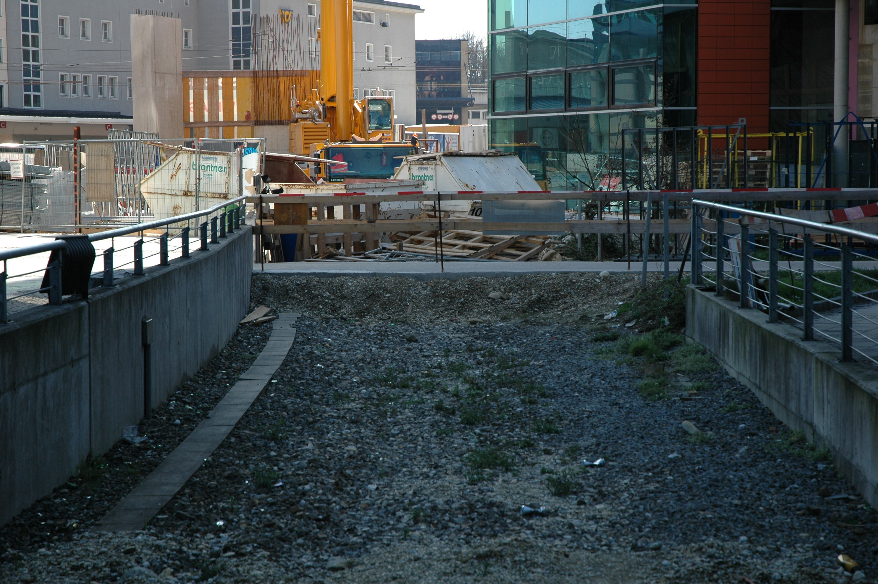 Ehemalige Trasse der LILO in Linz, direkt vor dem neuen Wissensturm im Bahnhofsviertel.